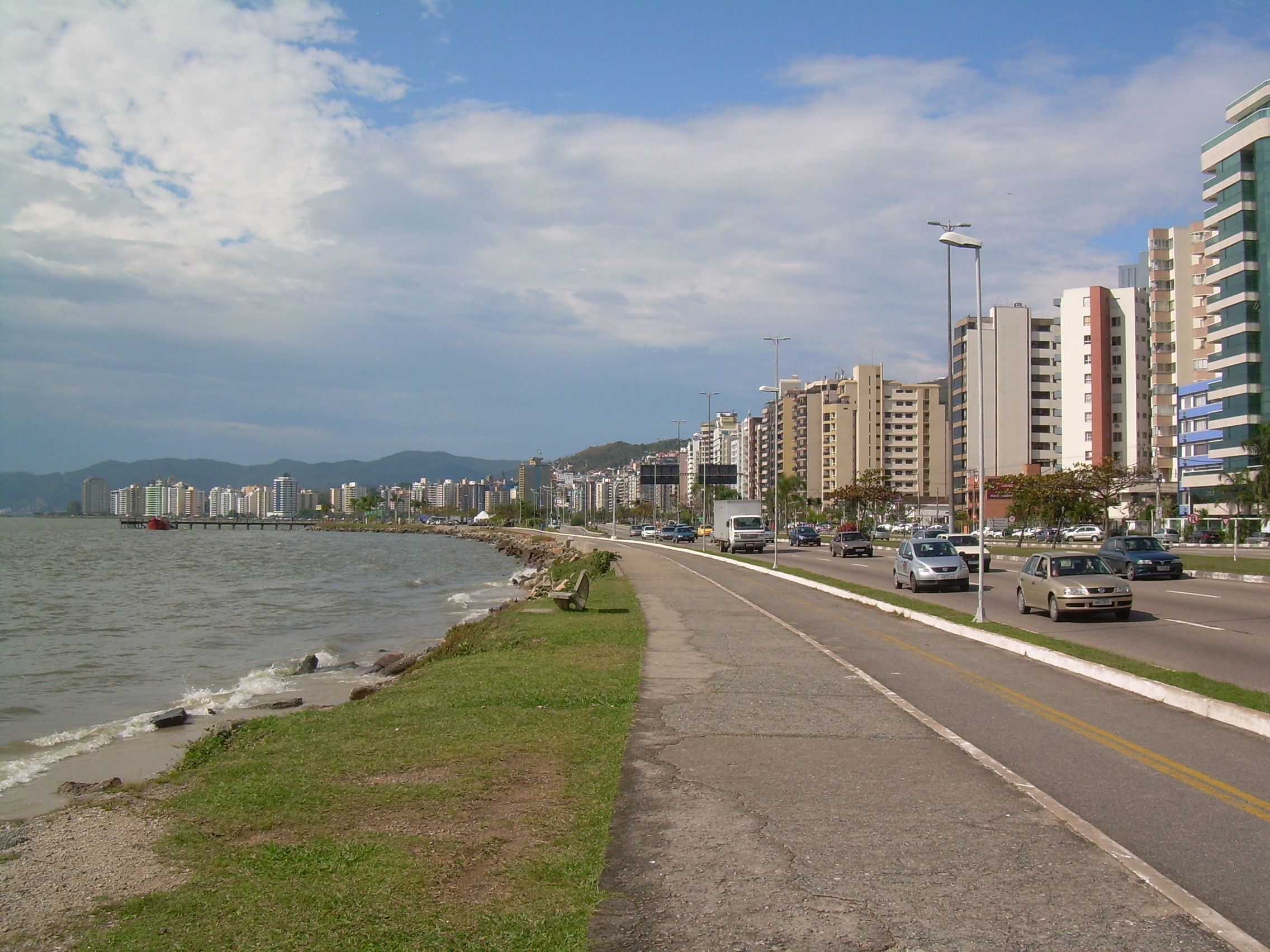 Av. Beira-mar em Florianópolis